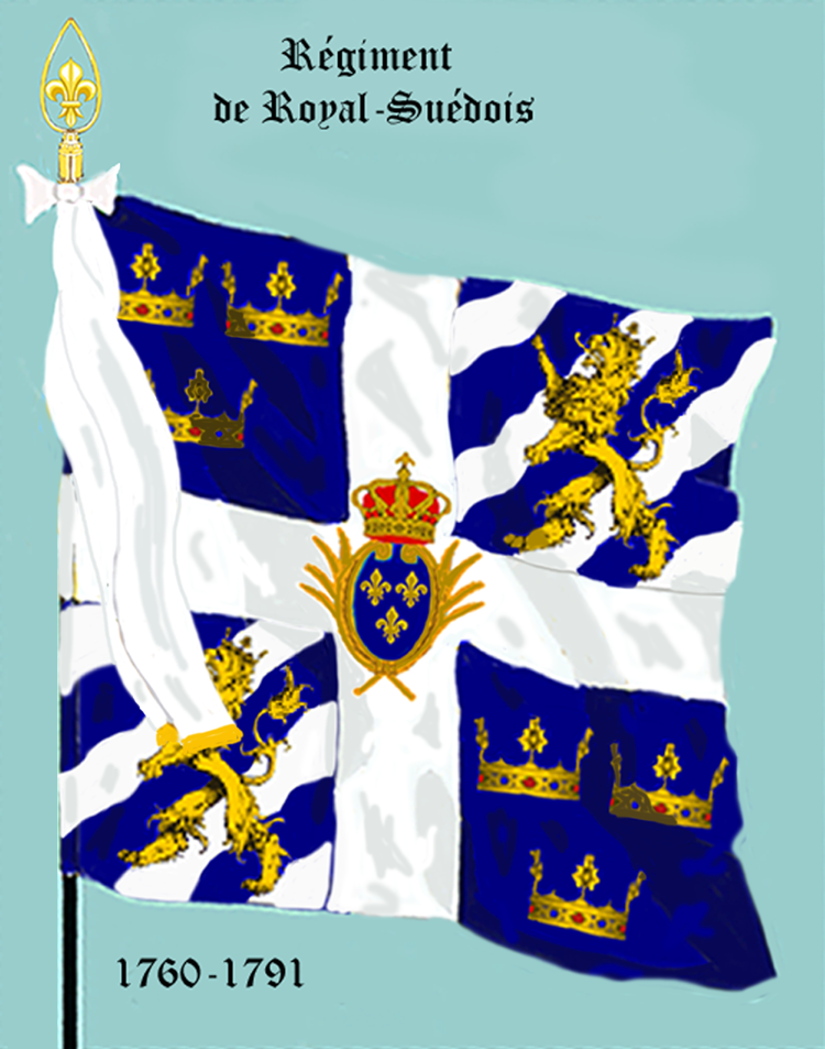 Ordonnanzfahne eines königlich französischen Infanterie-Regiments. (Fremdenregiment aus Deutschland)- Entnommen und überarbeitet aus: „LES UNIFORMES ET LES DRAPEAUX DE L'ARMÉE DU ROI“ Marseille 1899. (Drapeau d'Ordonnance d'un régiment française d'infanterie royale. (Régiment etrangéré allemande.)